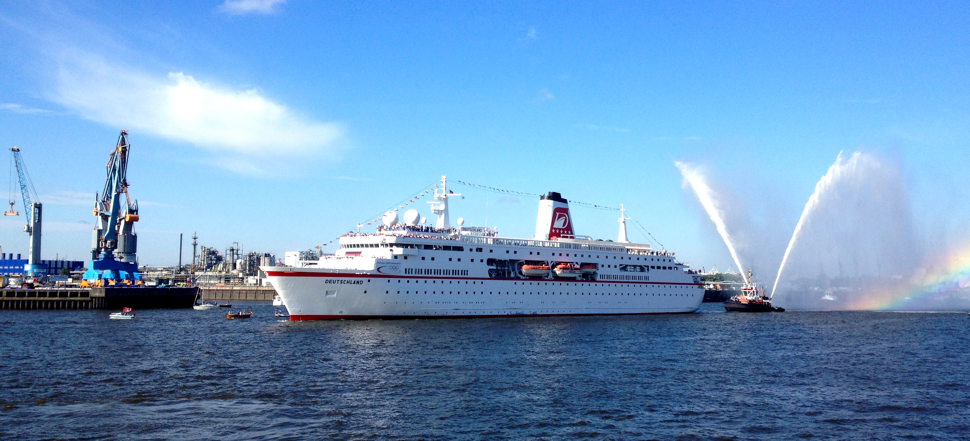 MS Deutschland bringt einen Großteil der deutschen Olympia-Athleten am 15. August 2012 nach Hamburg. Das Bild zeigt die MS Deutschland kurz vor dem Anlegemanöver im Cruise Center HafenCity, Hamburg.